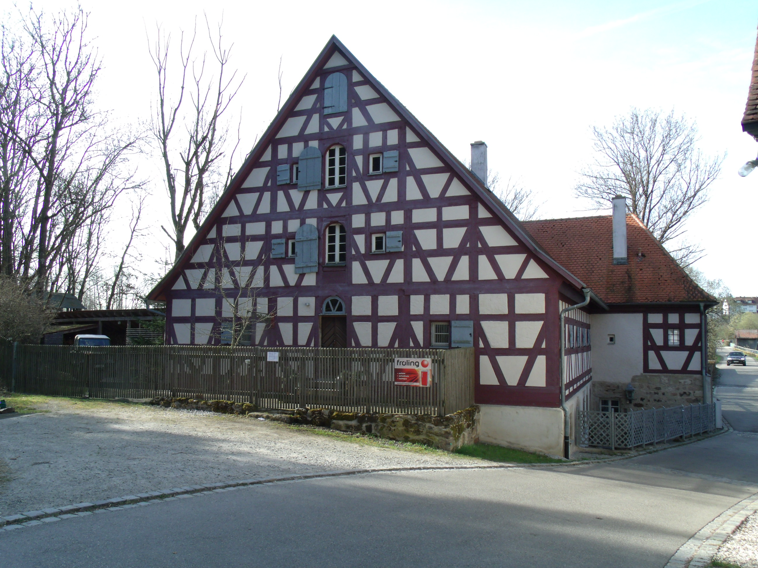 Scheermühle, Ortsteil von Ansbach in Mittelfranken